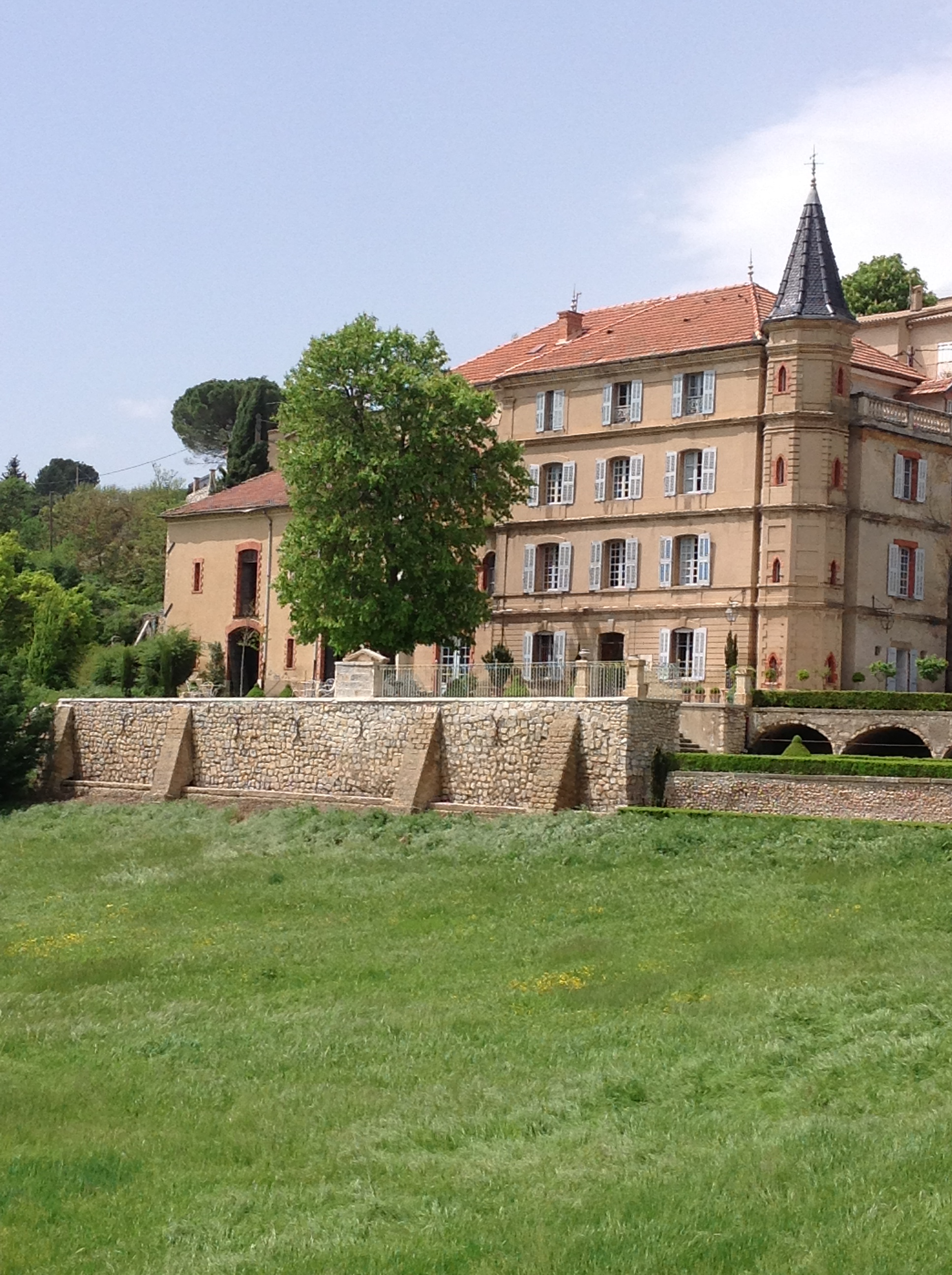 Vue générale